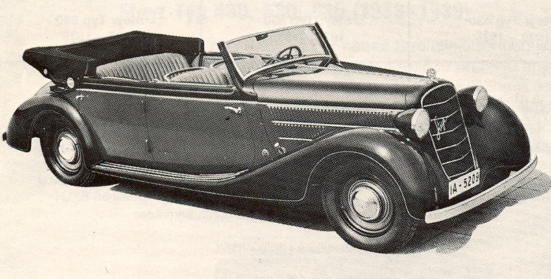 Steyr 630 Covertible 4 doors (Body: Gläser) (1937)